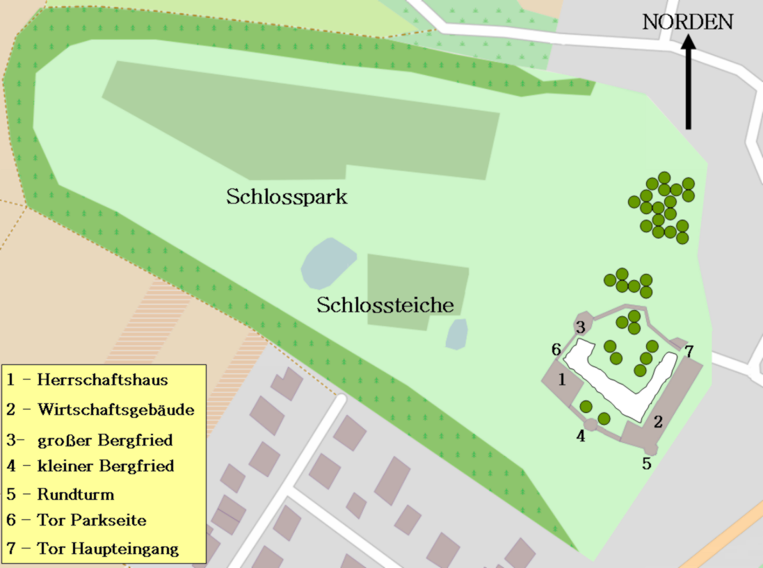 Lageplan des Schlosses Ernsthofen in Modautal in Hessen im Odenwald